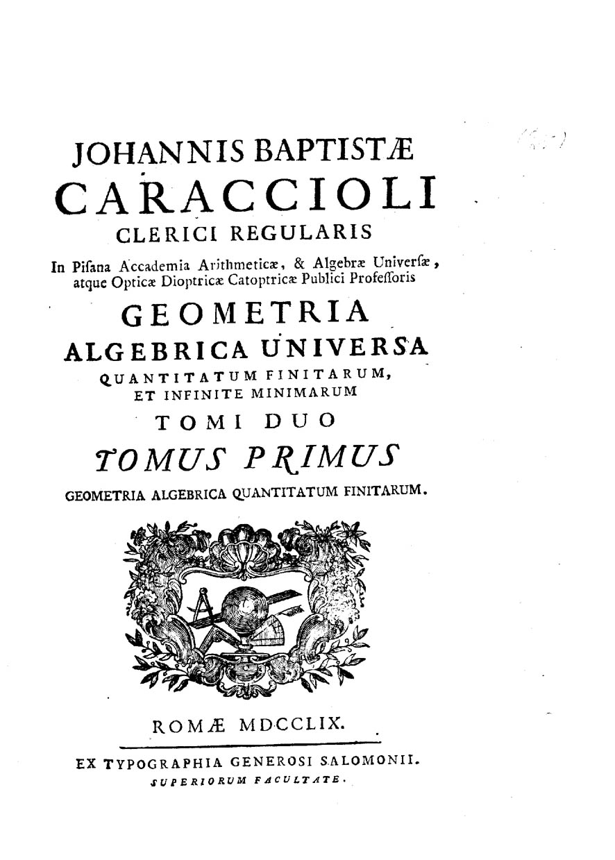 Johannis Baptista Caraccioli clerici regularis ... Geometria algebrica universa quantitatum finitarum, et infinite minimarum tomi duo. Tomus primus. - Romae : ex typographia Generosi Salomonii, 1759. - [8], 389, [3] p., VII c. di tav. ripieg. ; 4º .